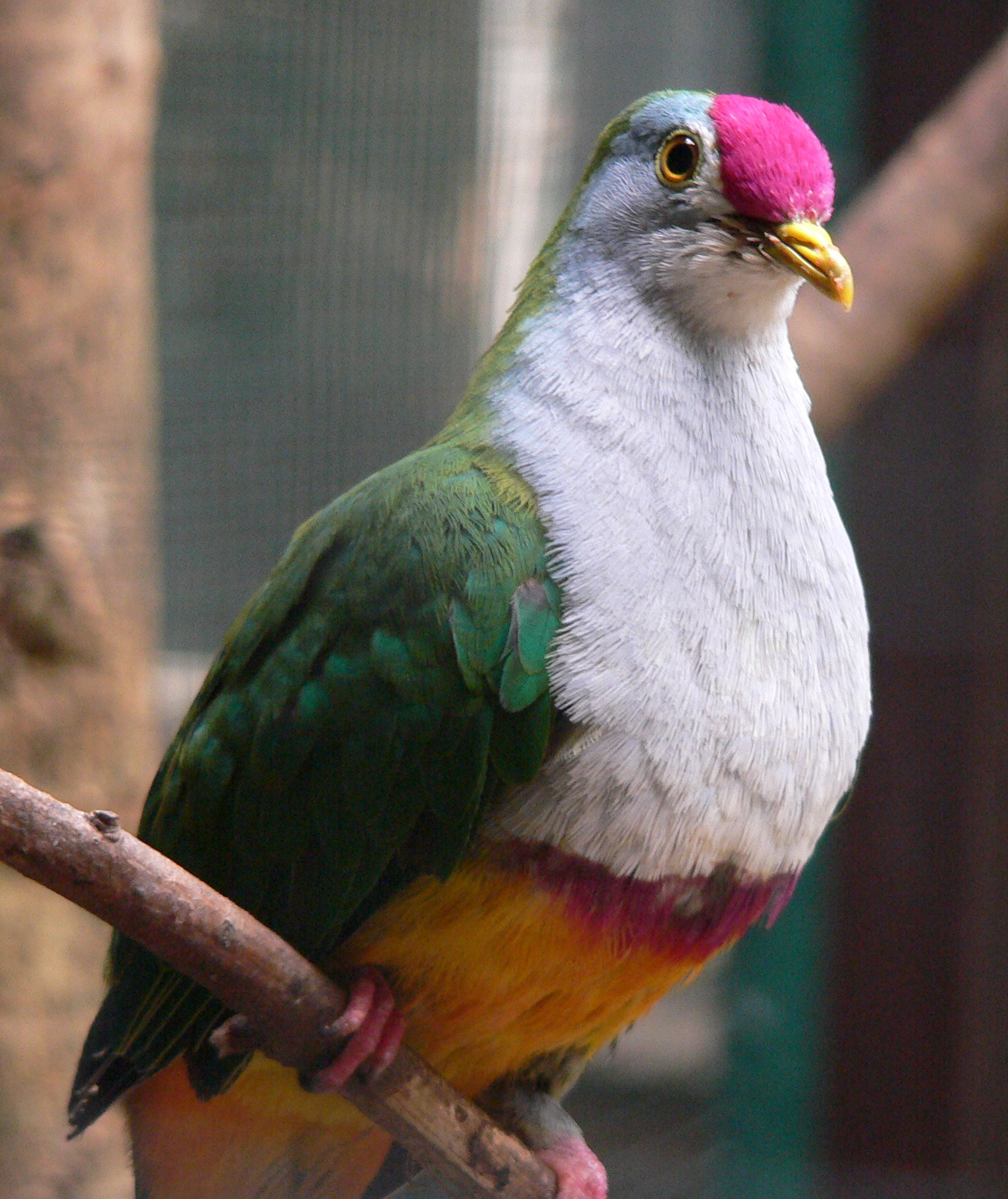 Ptilinopus pulchellus